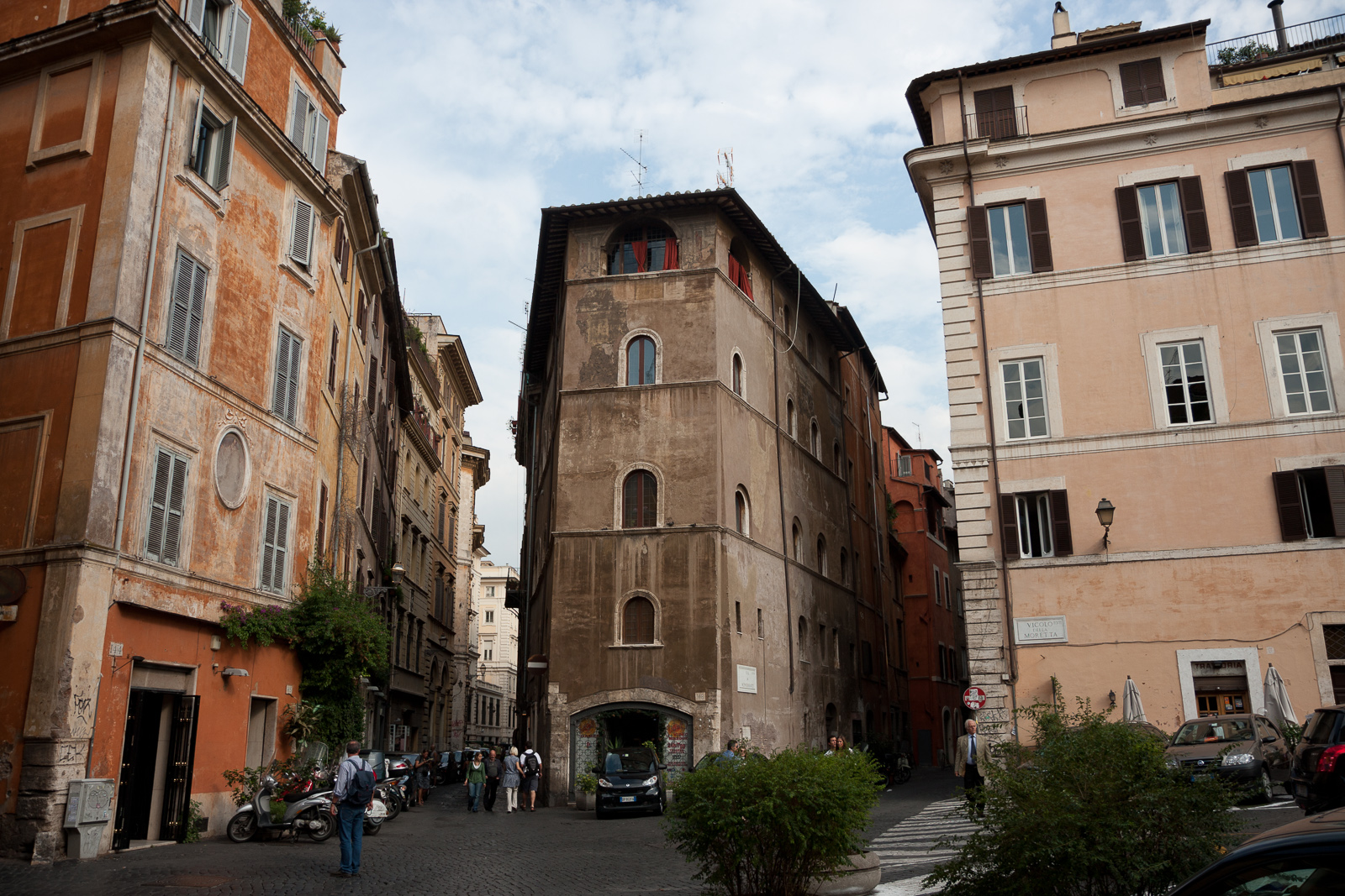 Rione VII Regola, Roma, Italy